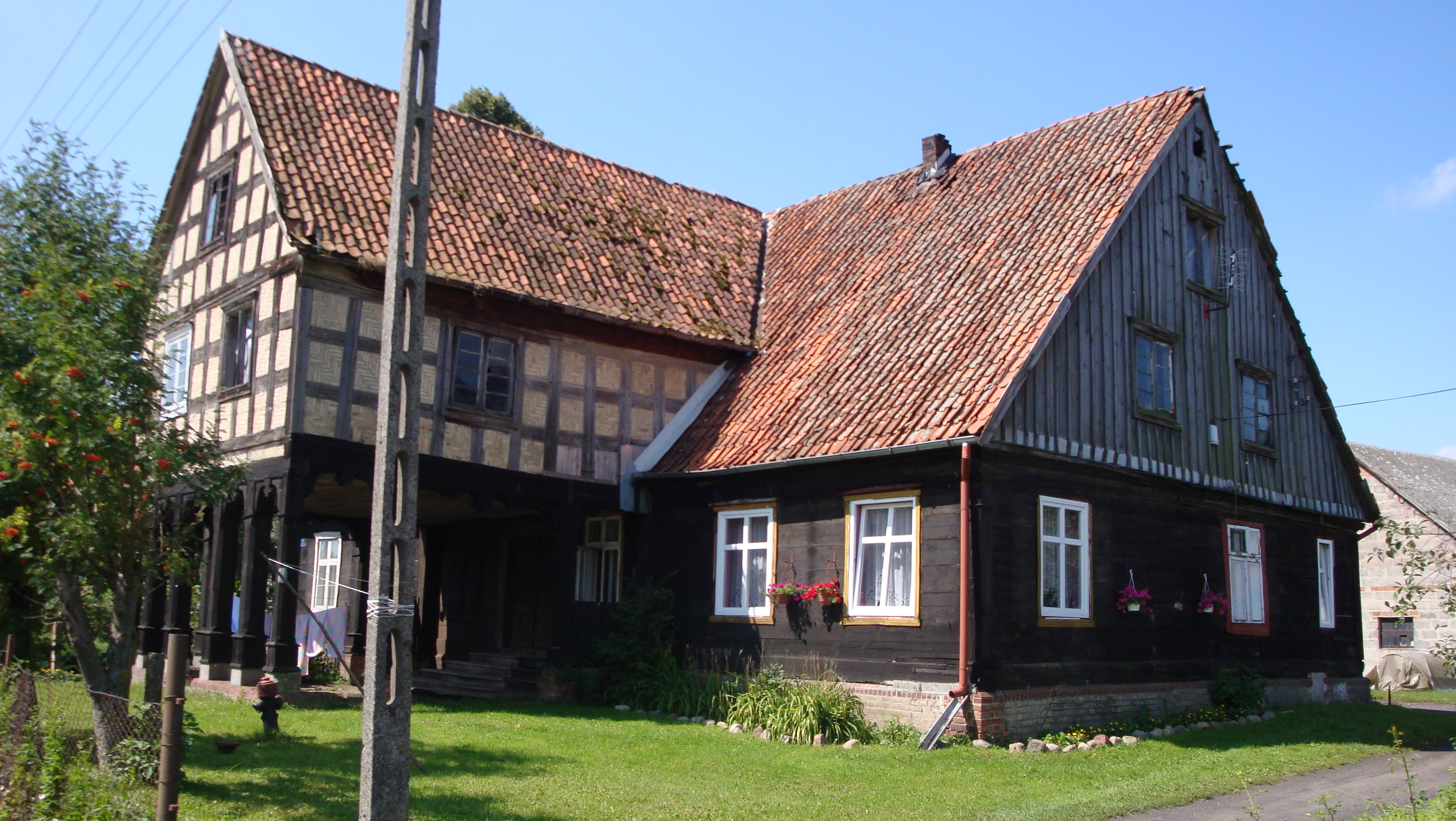 Marynowy 46/54 - dom podcieniowy, pierwotnie własność Jacoba Diercksena, 1804 (zabytek nr 120/N z 20.09.1961)